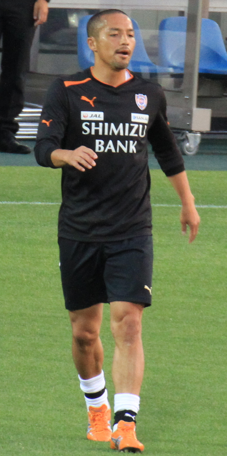 Shinji Ono of Shimizu S-Pulse